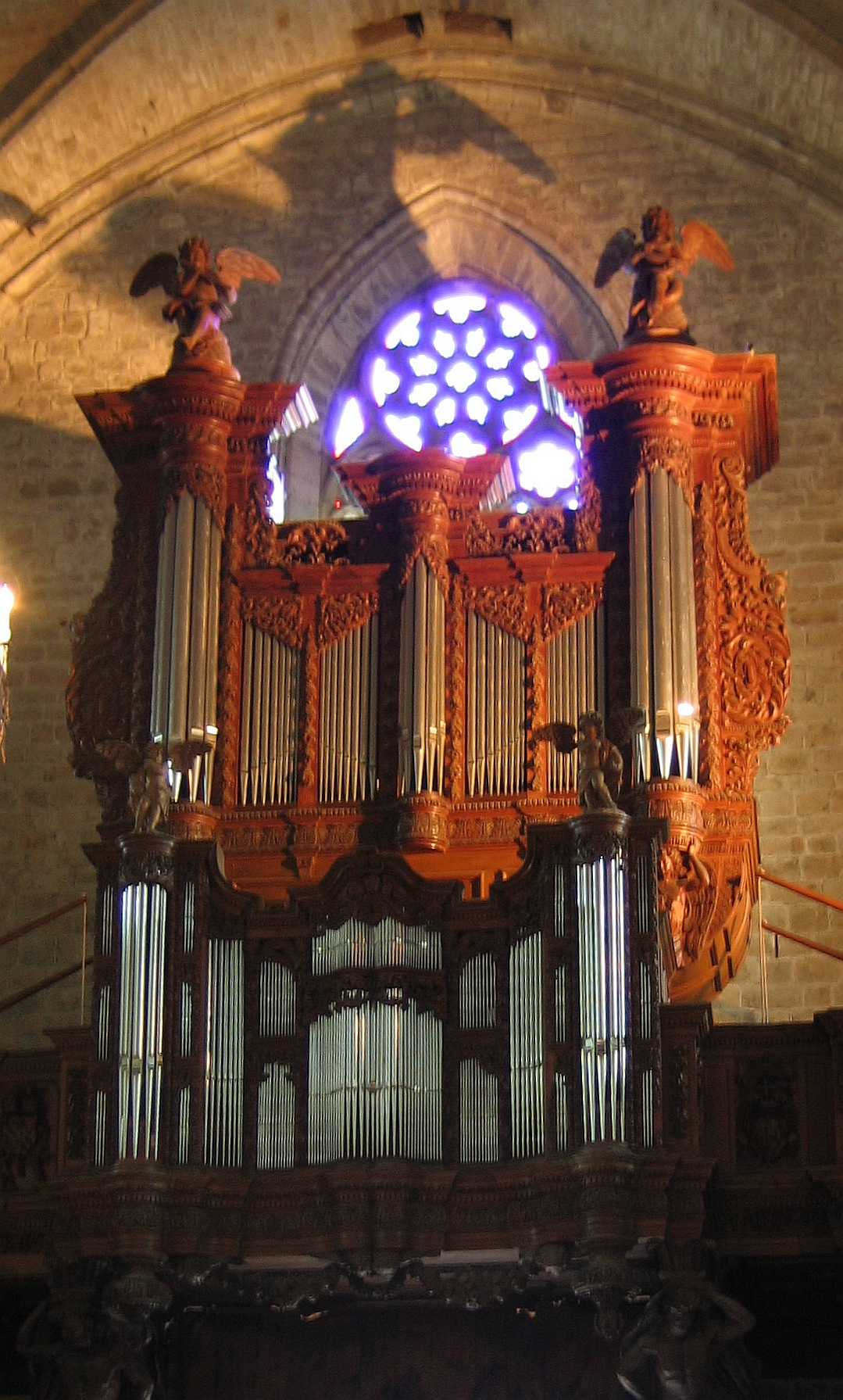 La Chaise-Dieu, Orgue de Église abbatiale de Saint-Robert